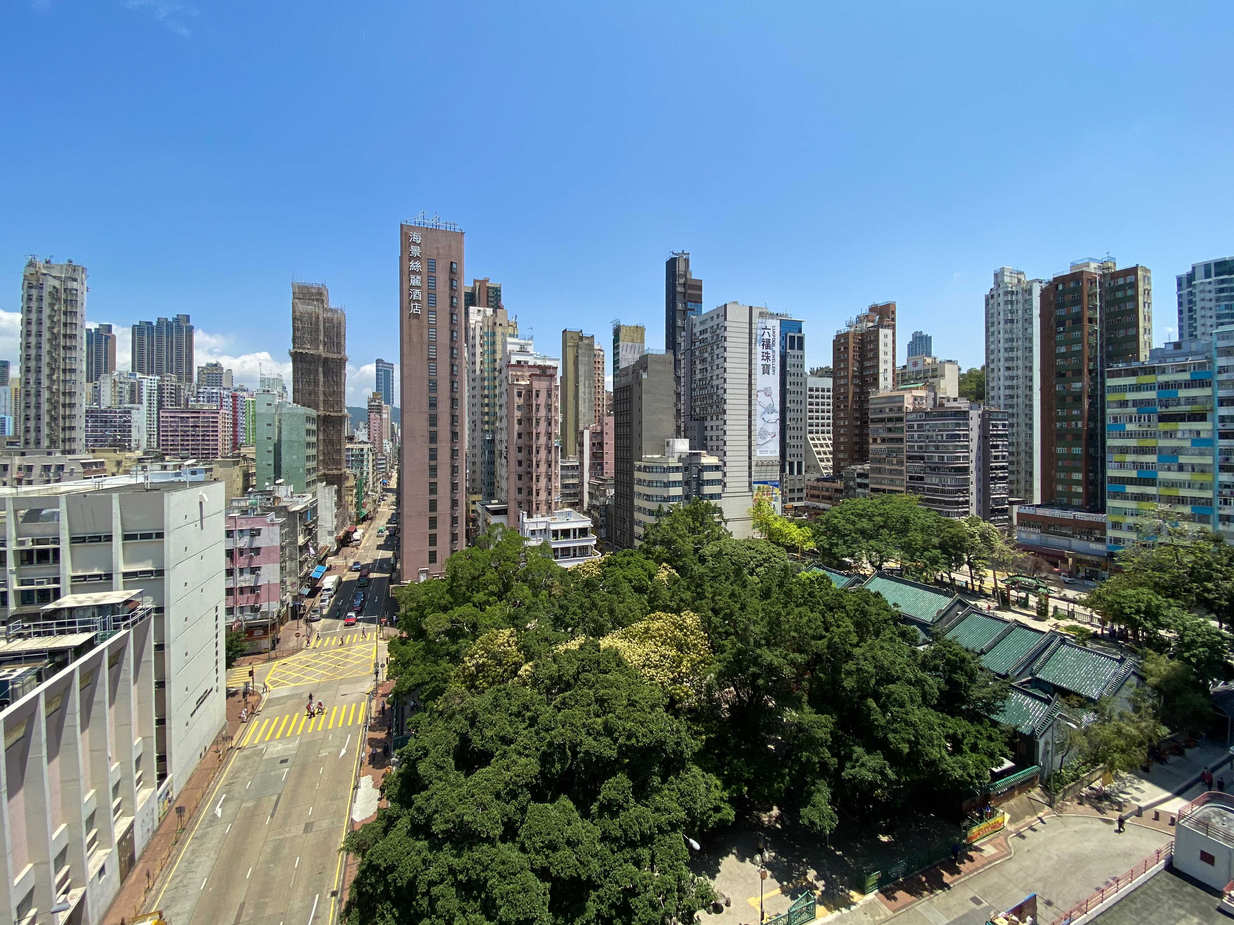 Yau Ma Tei Community Centre Rest Garden